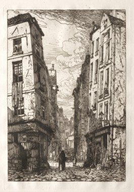 Rue des Marmousets